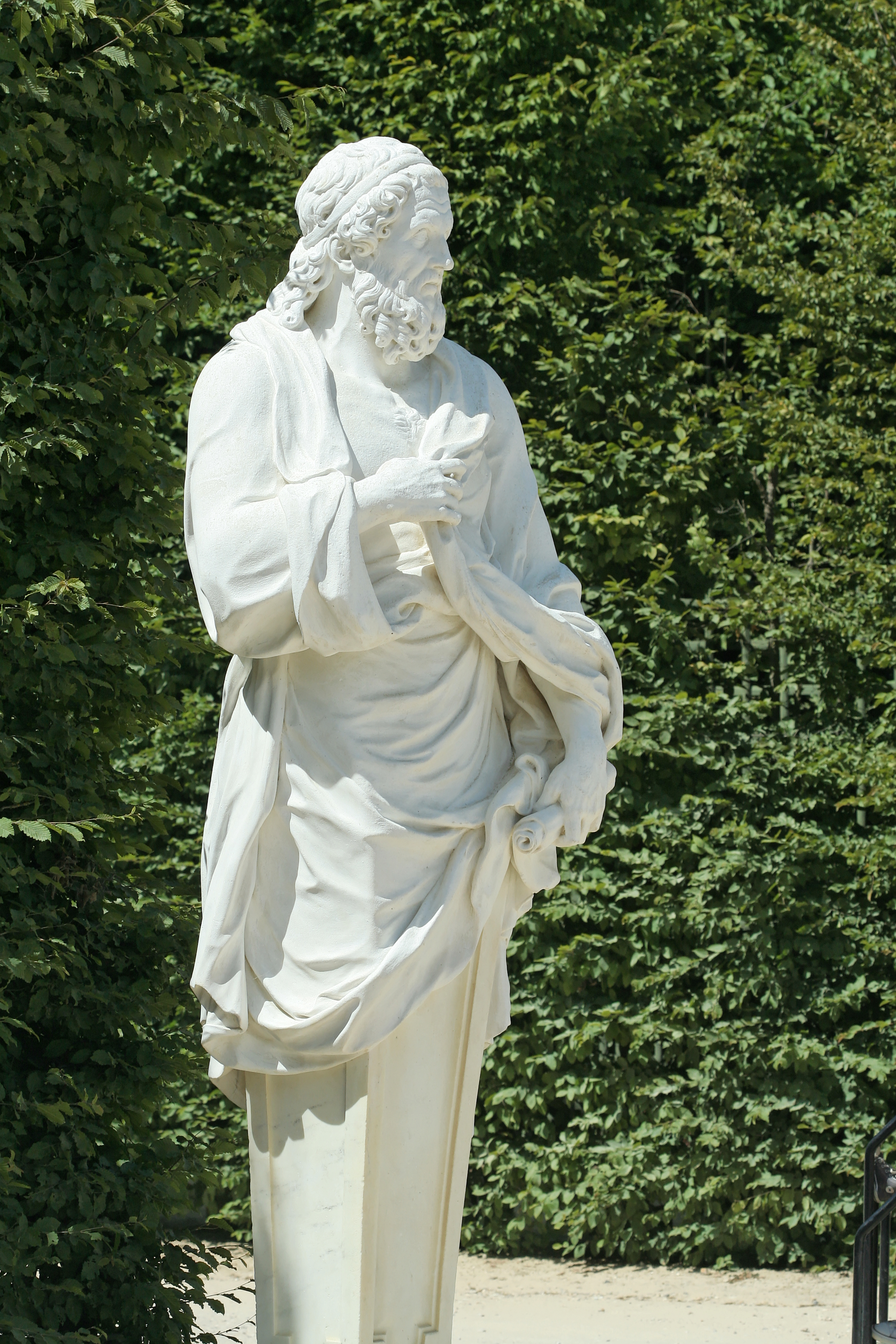 Parc de Versailles, Rond-Point des Philosophes. Isocrate, Pierre Granier (1684-1688) MR1870